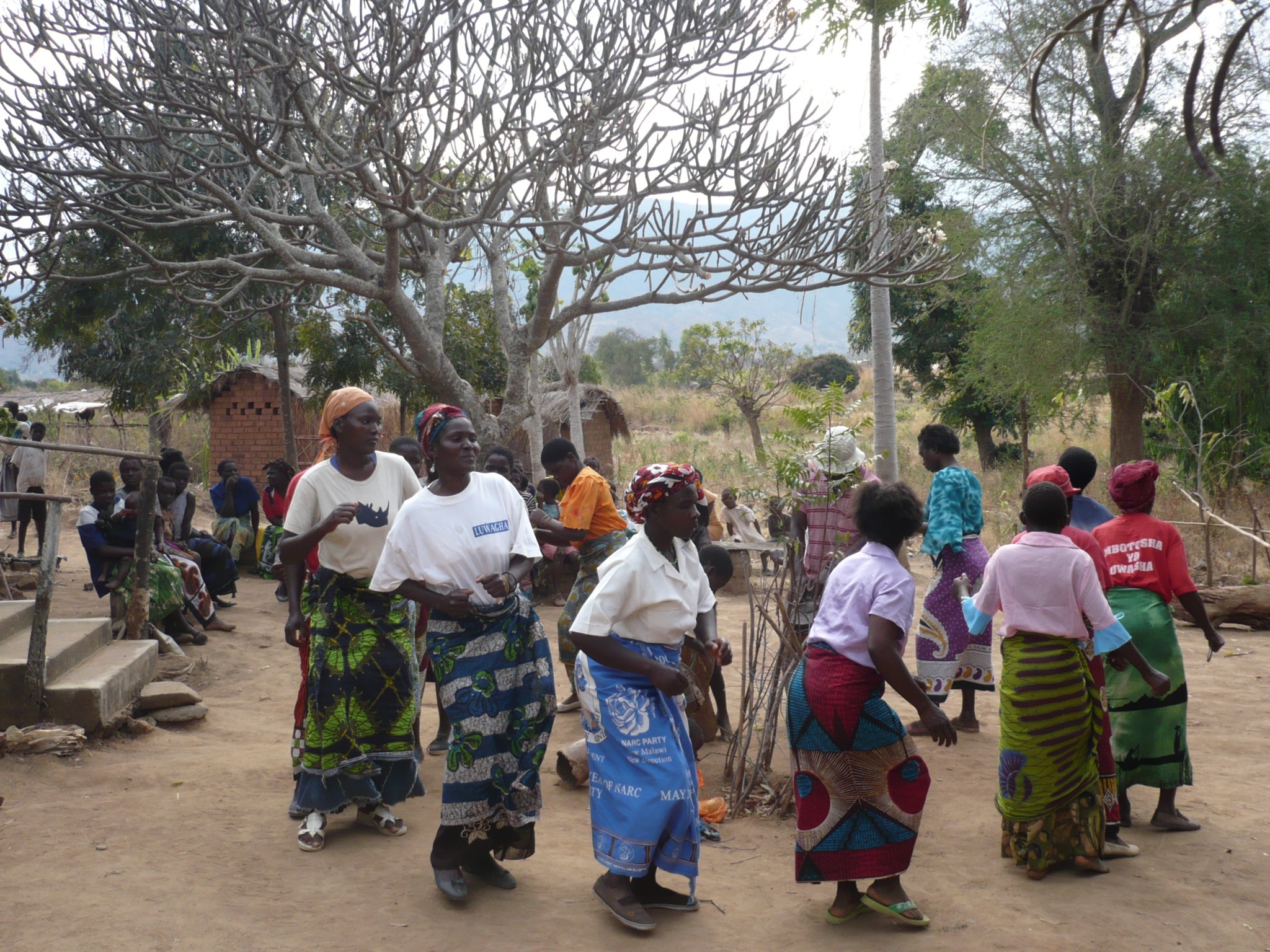 Kreistanz im Norden von Malawi